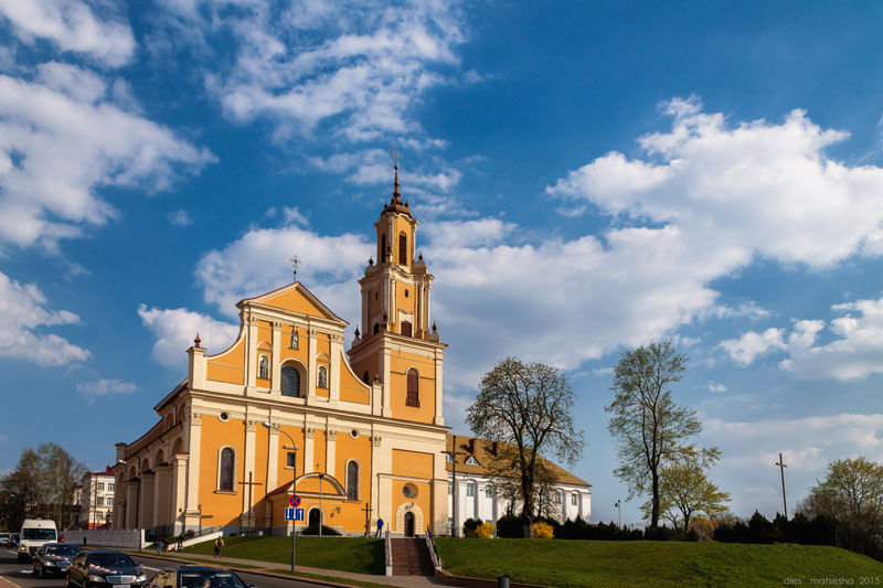 Гродна. Касцёл Адшукання Святога Крыжа і кляштар бернардзінцаў